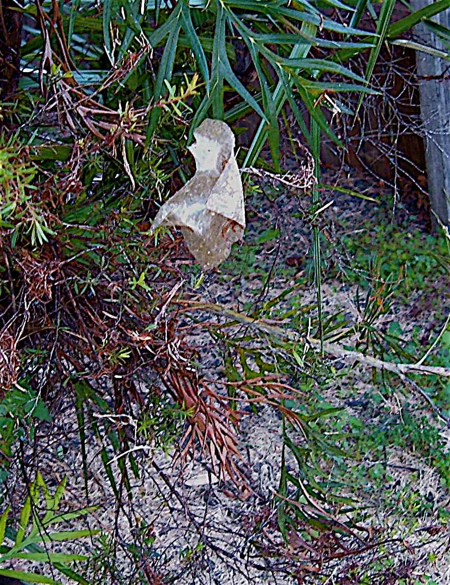 P. graeffei in scrap paper